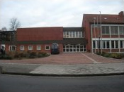 Das Ratsgymnasium Rotenburg (Dezember 2015)